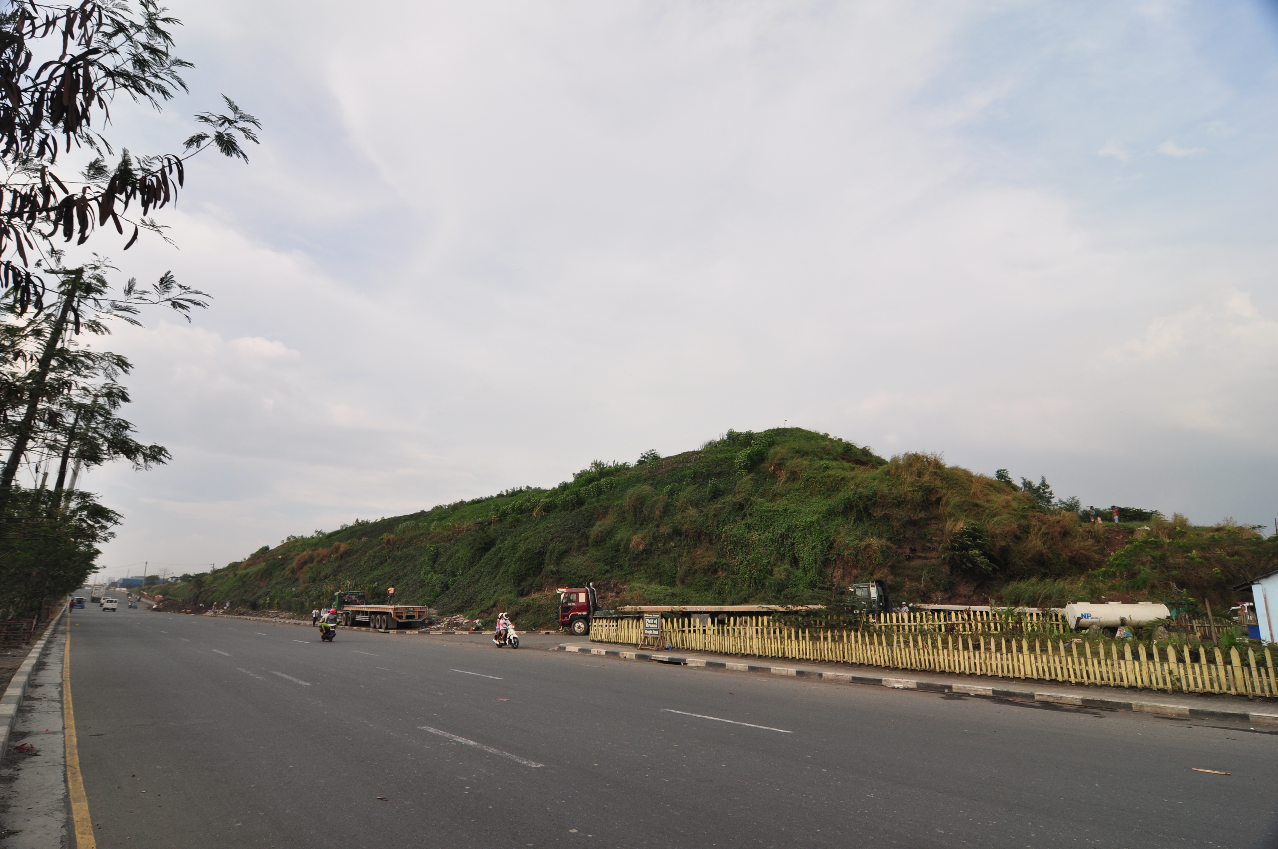 Smokey Mountain in Manila, Philippines